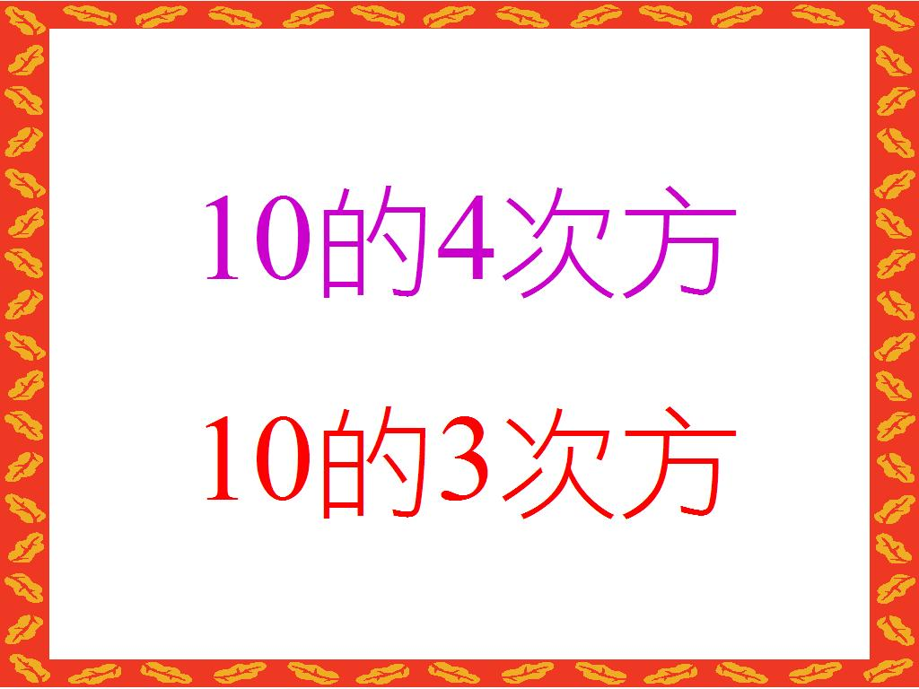 模擬臺灣超級電視台《黃金傳奇》內的提示，非由超級電視台工作人員提供